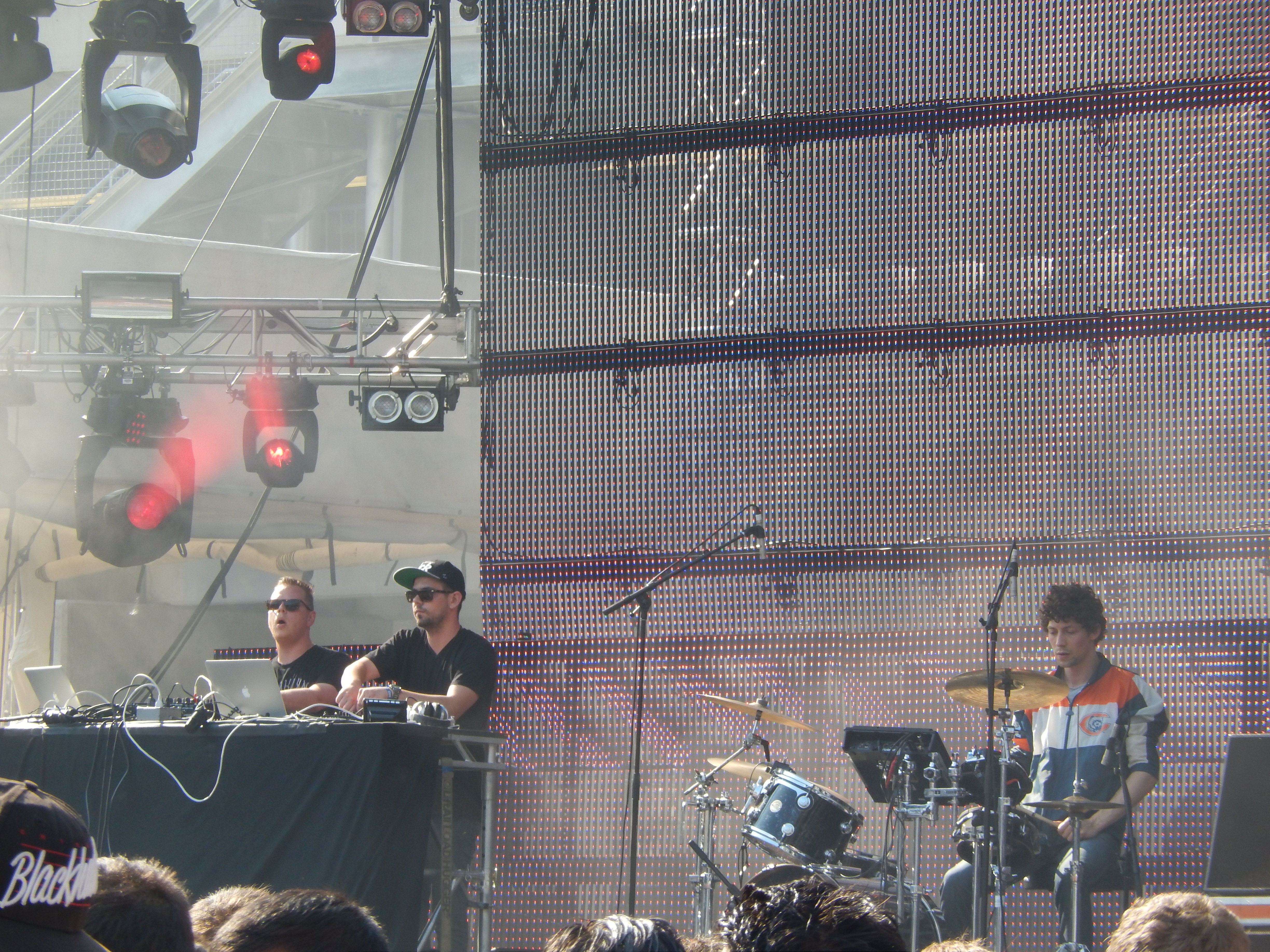 Savoy